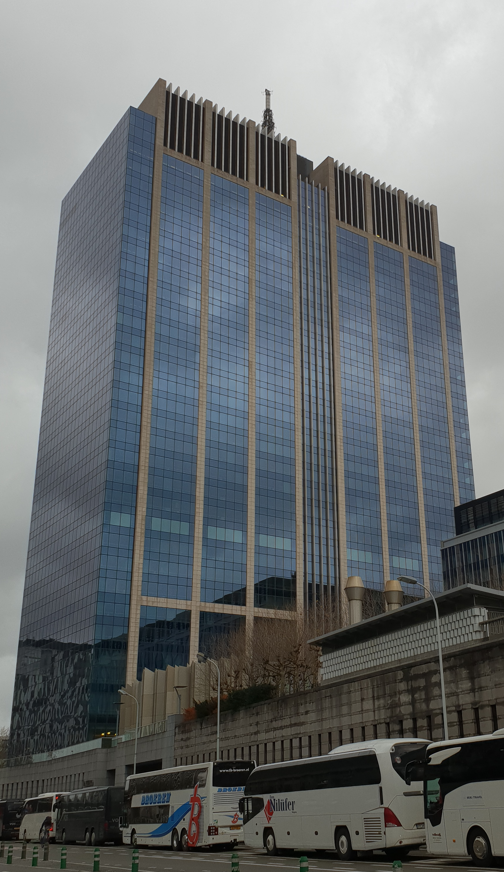 Tour Martini